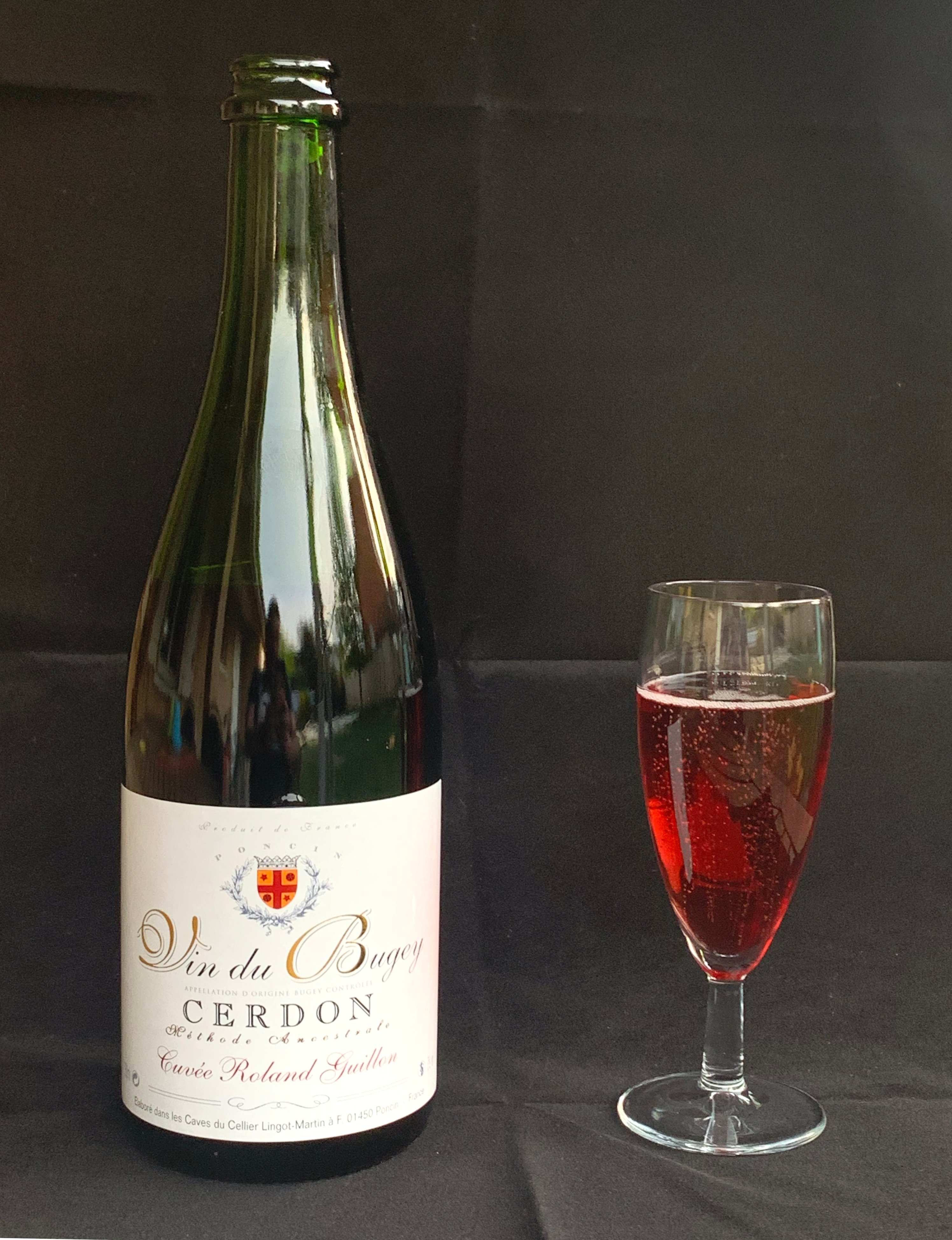 Bouteille de Cerdon et verre (confinement 2020).